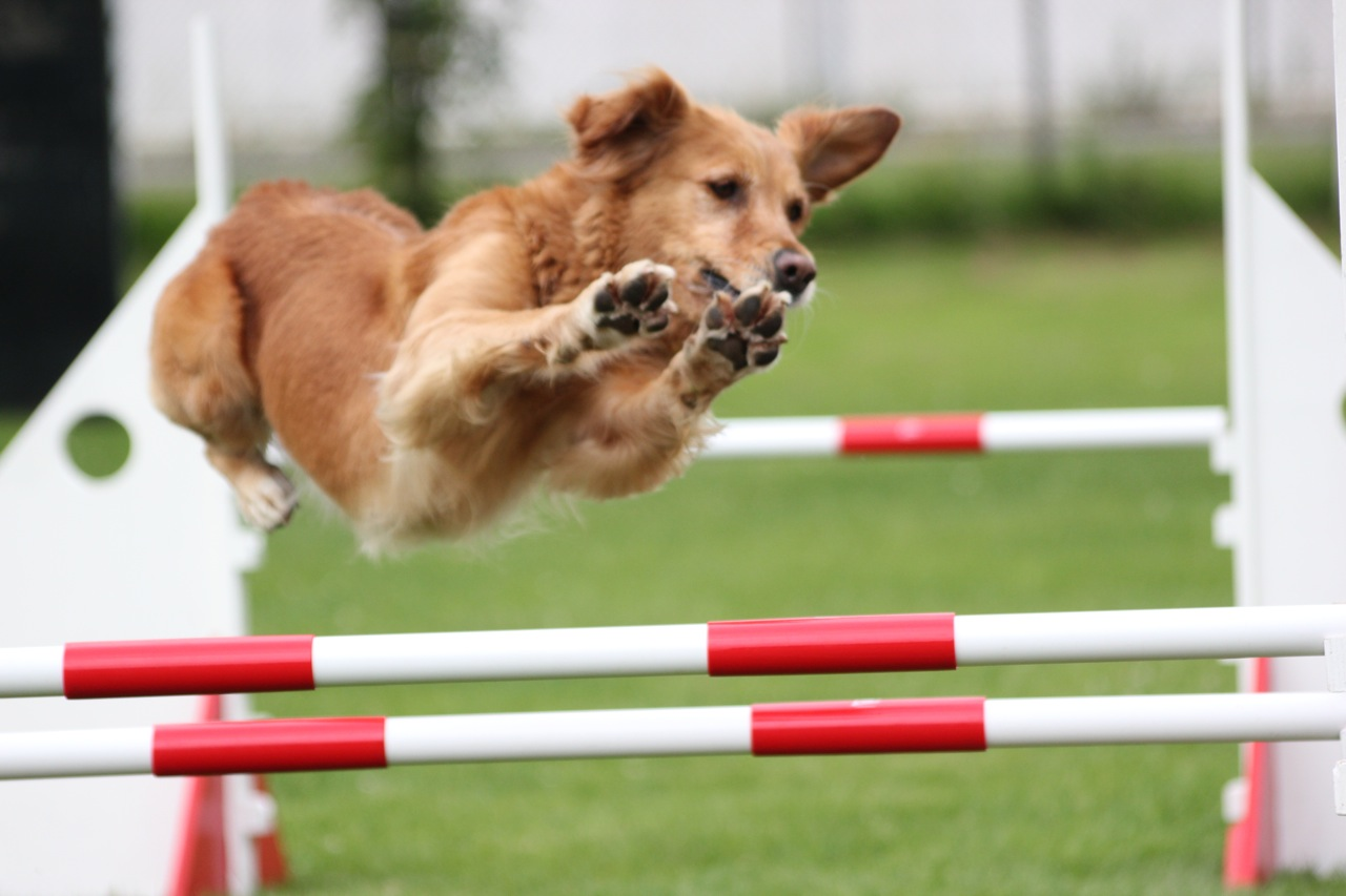 Happy from the Go-Getters, golden retriever, agility, Power of Gold